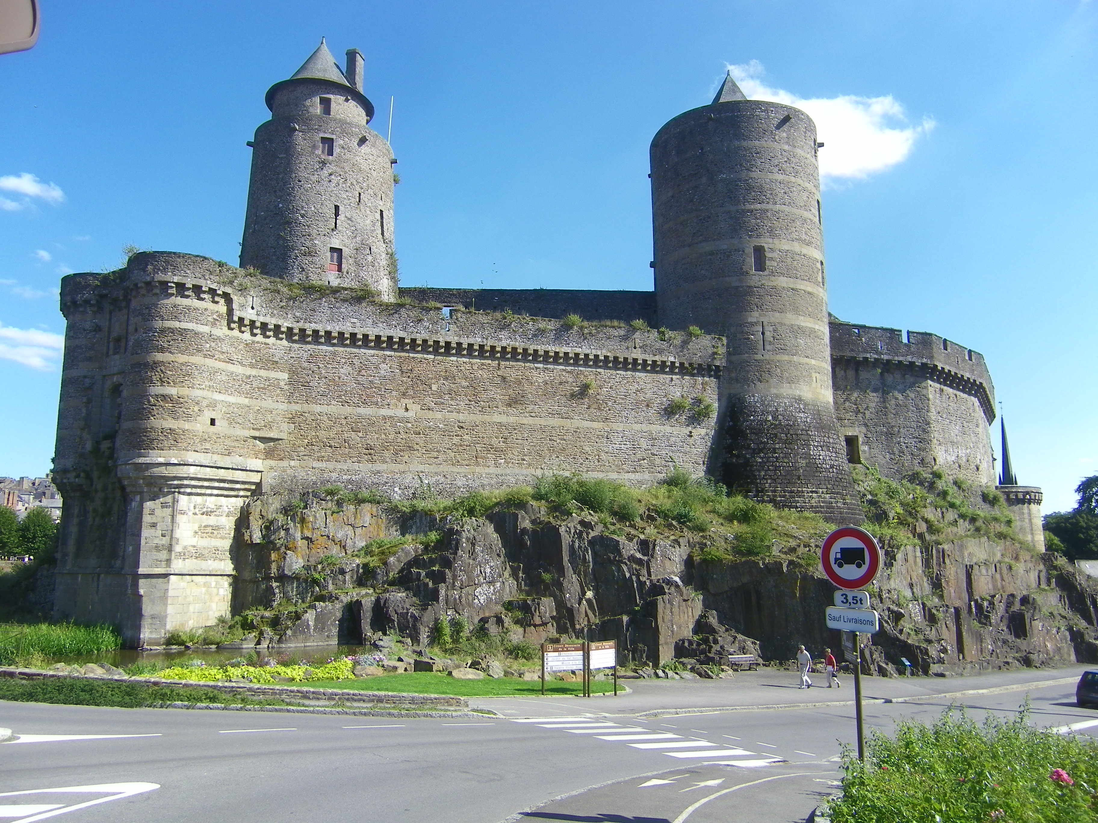 Face sud du mur d'enceinte